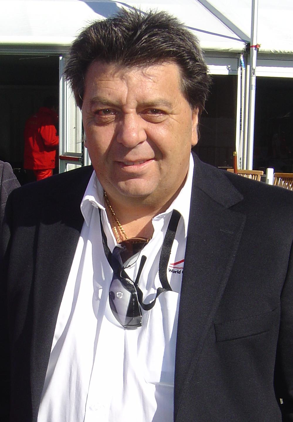 Tony Teixeira im Rahmen des A1GP-Rennwochenendes auf dem Automotodrom Brno